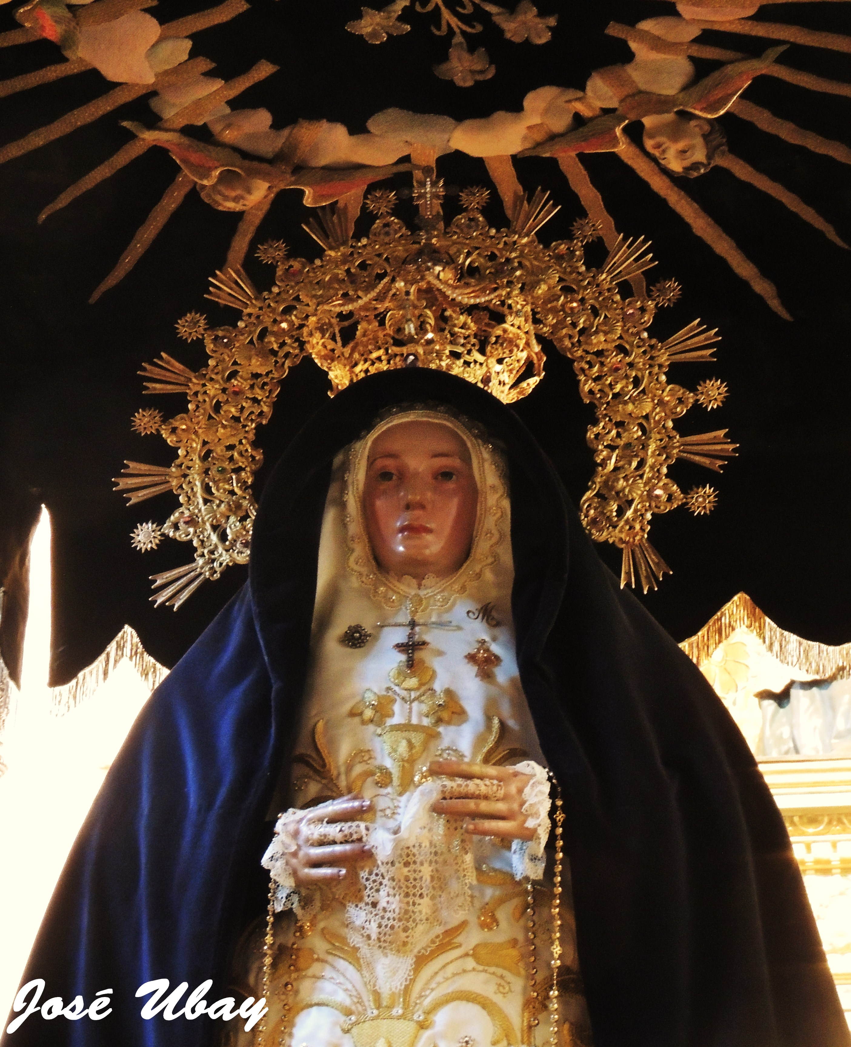 Nuestra Señora de la Soledad de la Portería. Anónimo. Siglo XVI. Parroquia de San Francisco de Asís y Santuario de Nuestra Señora de la Soledad de la Portería. Las Palmas de Gran Canaria.